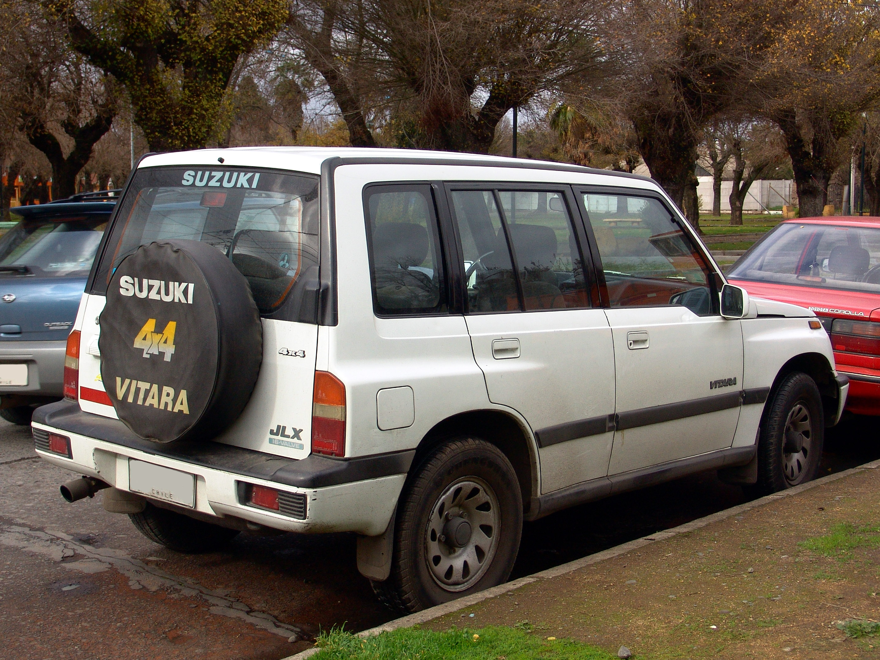 Suzuki Vitara 1.6 JLX 1996